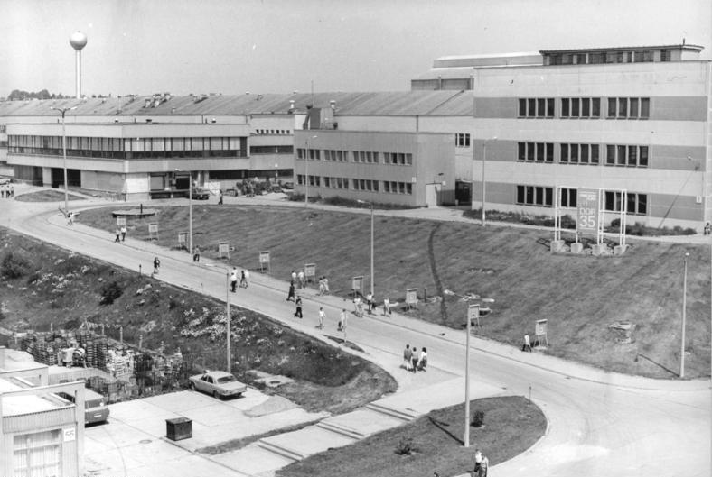 Ilmenau, Industriekomplex ADN-ZB Schaar 1.10.84 Bezirk Suhl: 35. Jahrestag-Enstanden in der DDR: Kominat Technisches Glas Ilmenau- 1979 nahm ein moderner Industriekomplex mit dem Stammbetrieb des Kombinates, dem Werk für Technisches Glas Ilmenau, seine Arbeit auf. Er vereinigt zugleich die wichtigsten der insgesamt neun Erzeugnisstrukturlinien des Kombinates, darunter die Fertigung chemisch-technischer Hohlgläser, die Glasrohrproduktion, den Rationalisierungsmittelbau sowie die Kieselglasherstellung. Durch eine breite volkswirtschaftliche Anwendung seiner insgesamt 40.000 verschiedenen Erzeugnisse setzt das Kombinat mit 15 modernen Betrieben heute Erfahrungen der traditionellen Glasherstellung im Ilmenauer Raum fort. Mit der wachsenden Leistungskraft des Kombinates gingen auch umfangreiche sozial-politische Fortschritte einher. so stehen den Werktätigen allein 1984 6,7 Millionen Mark für die Verbesserung der Arbeits- und Lebensbedingungen zur Verfügung. - siehe auch 1984 1001-2 und 3N